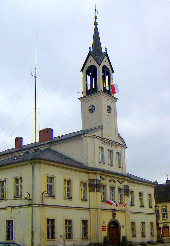 Lubawka - ratusz, 1726, XIX w. (zabytek nr rejestr. 669/J z 11.05.1981)